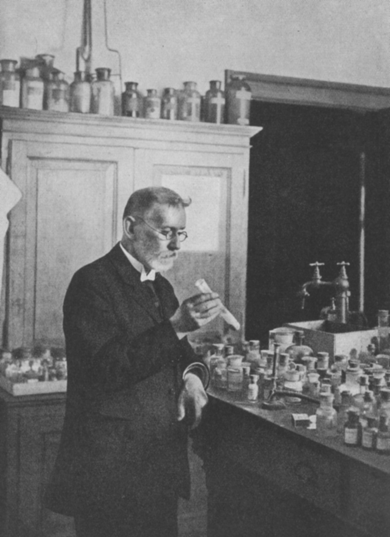 Paul Ehrlich im Laboratorium seines Institutes in Frankfurt am Main.